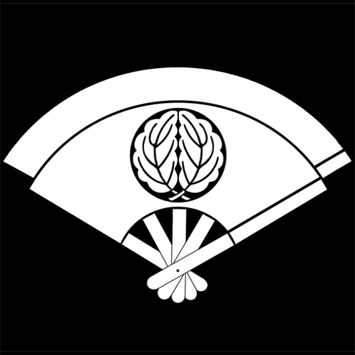 「重ね扇に抱き柏」紋（染抜）